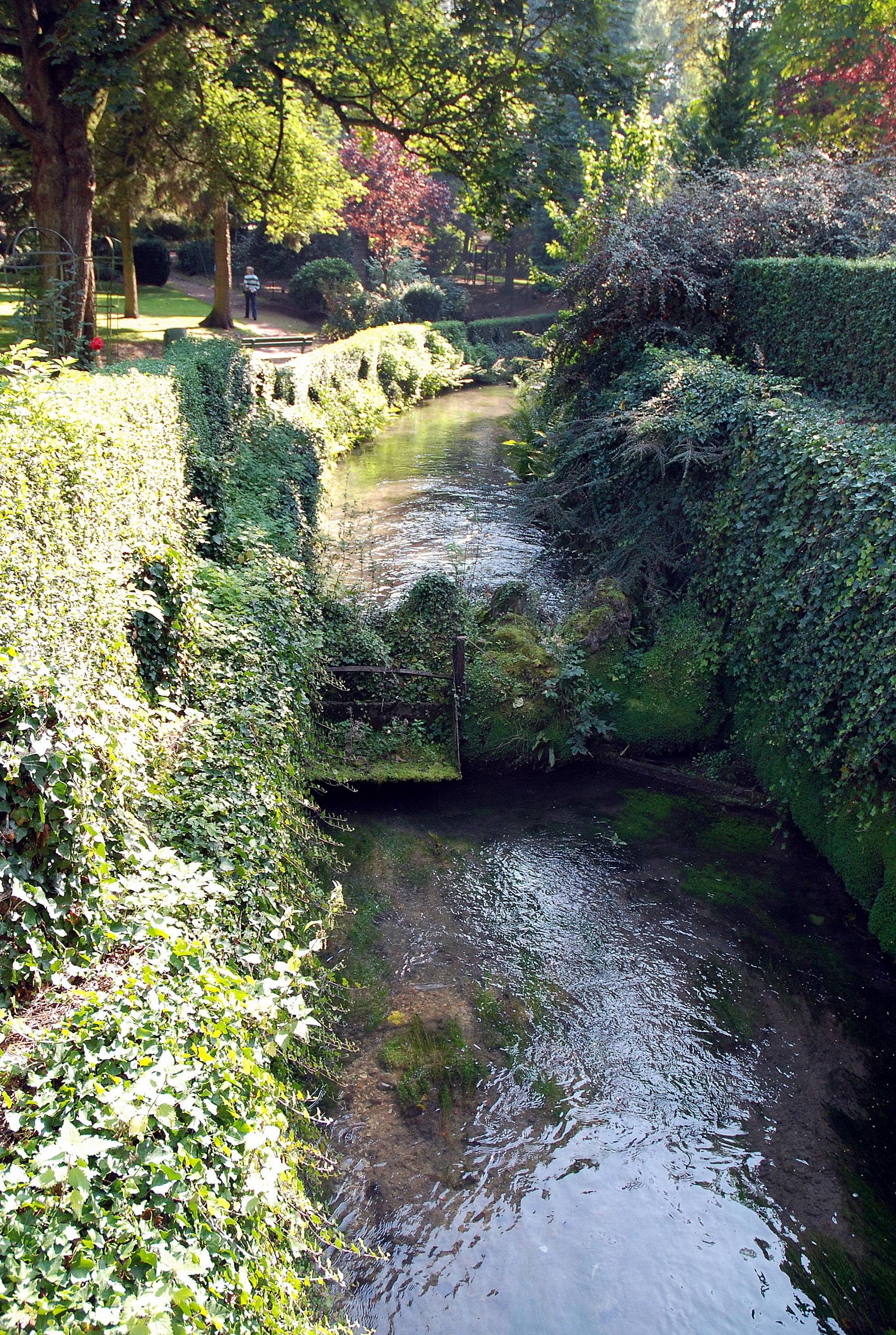 De Ancre in Albert, Frankrijk